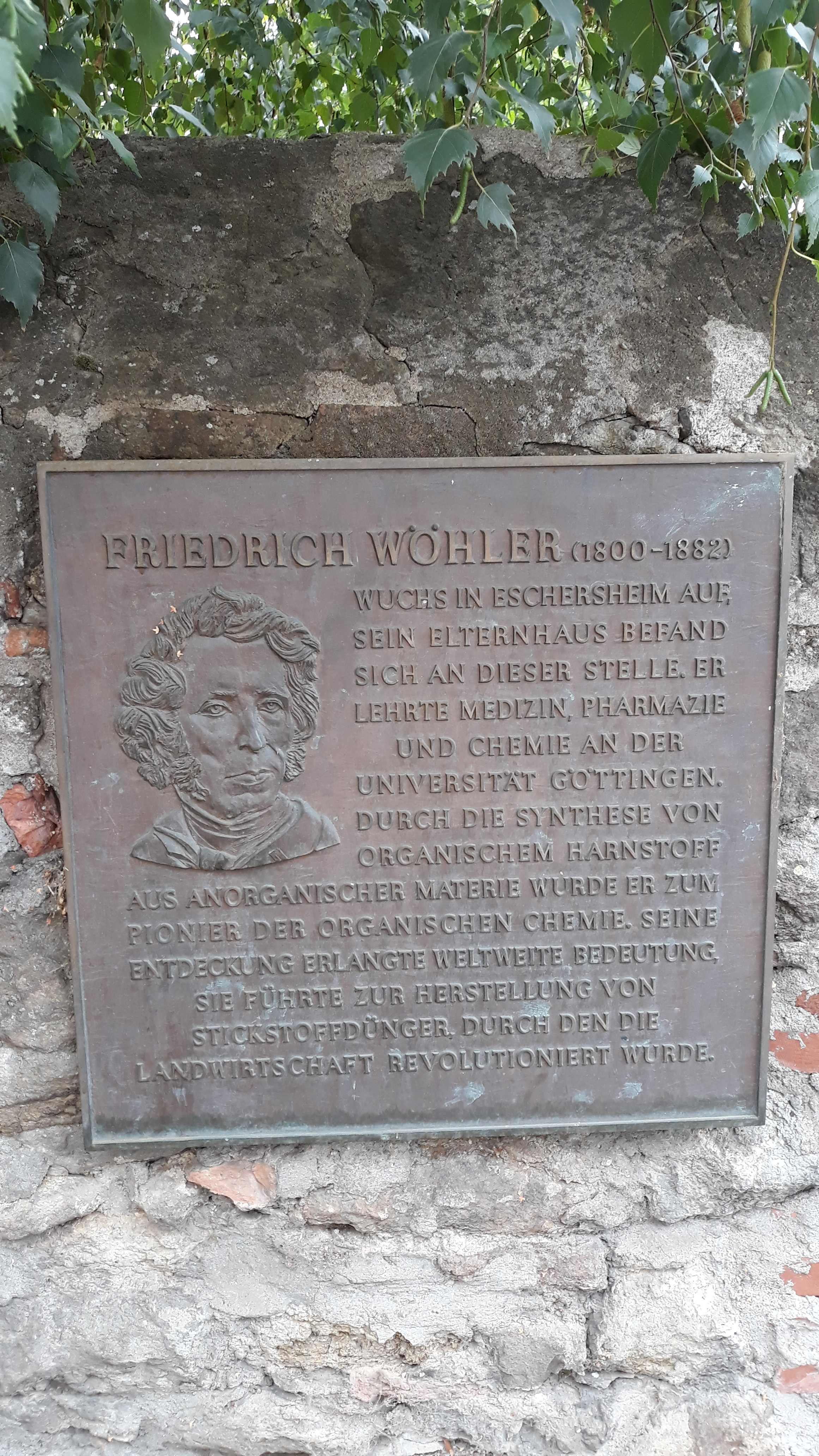 Gedenktafel am alten Geburtshaus von Friedrich Wöhler in Frankfurt am Main-Eschersheim.